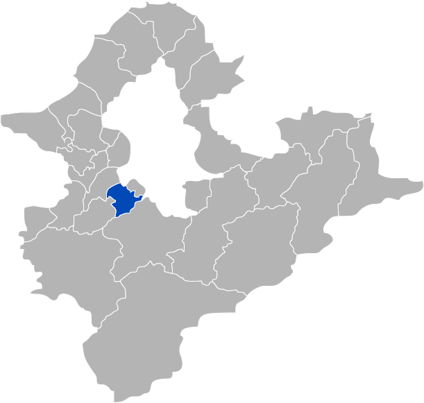 KaurJmeb為編寫中華民國臺灣省臺北縣中和市，於2005年2月6日所繪。